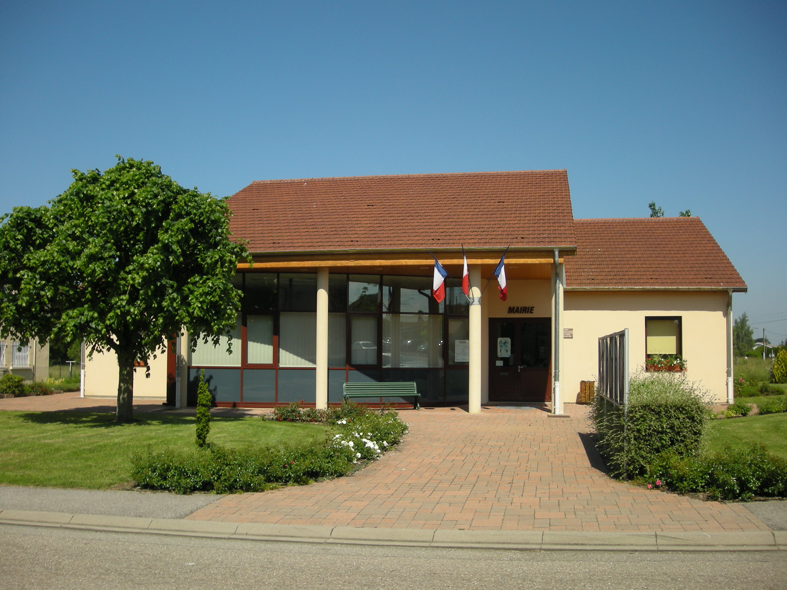 Mairie de Saint-Clément (Meurthe-et-Moselle)